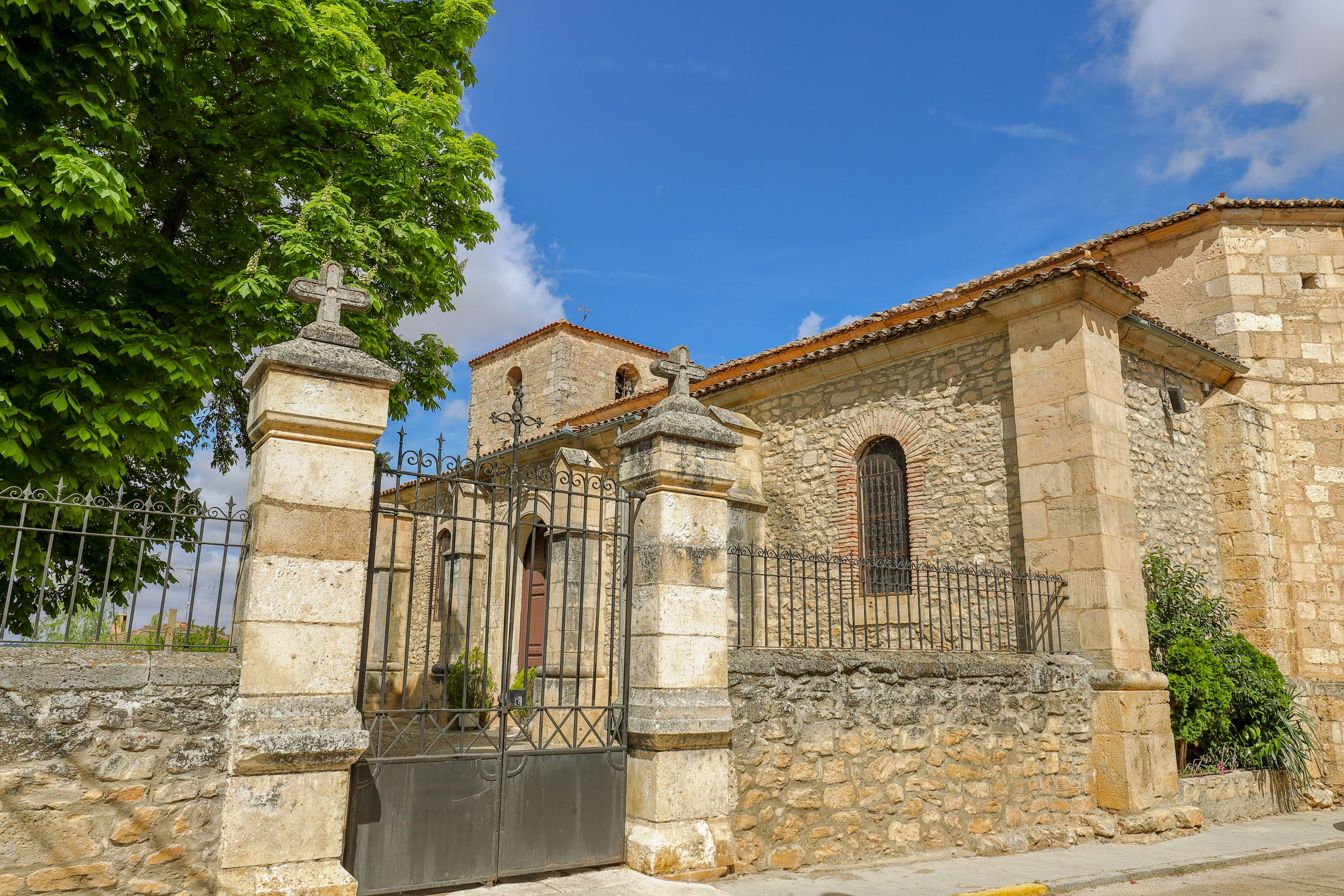 Villanueva de Gumiel es un municipio de la comarca Ribera del Duero, provincia de Burgos.